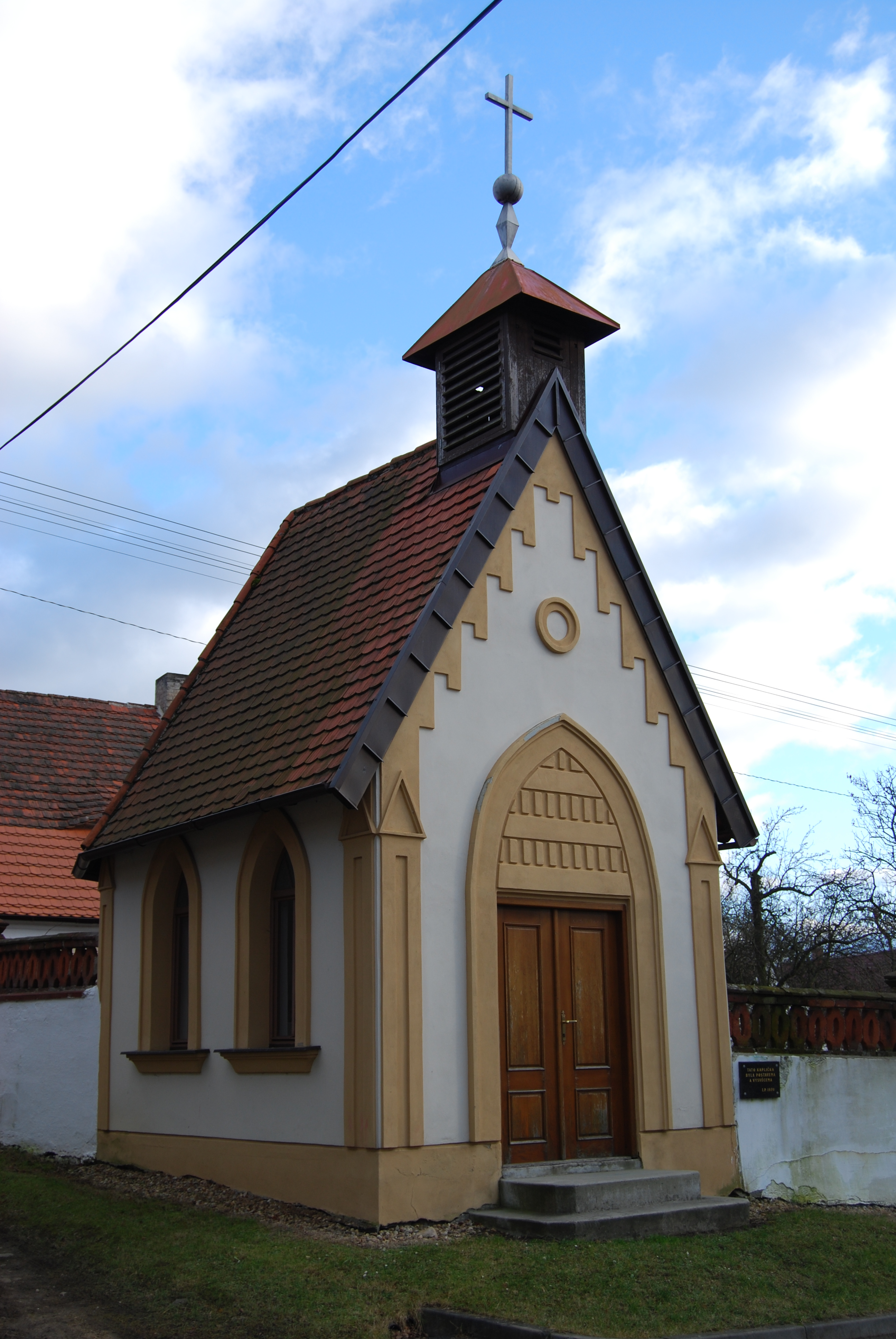 Kaple zasvěcená Panně Marii Královně v obci z roku 1970. Podolí I. Okres Písek. Česká republika.